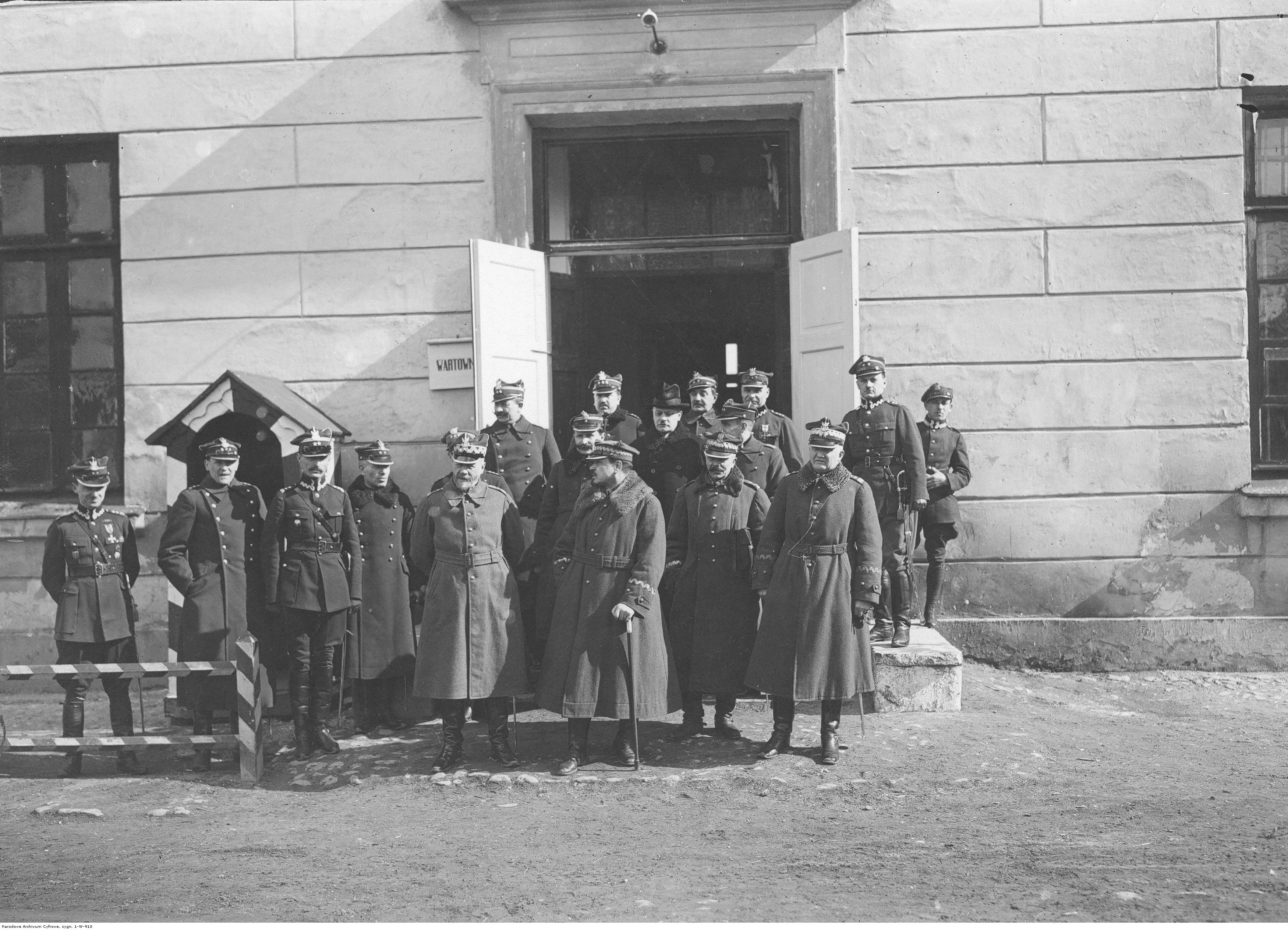 Otwarcie Szkoły Gazowej w Warszawie 12 marca 1925. Uczestnicy uroczystości przed budynkiem. W pierwszym rzędzie od prawej: gen. Stefan Suszyński, gen. Kazimierz Pławski, gen. Józef Haller, gen. Lucjan Żeligowski, ppłk Walery Jasiński. Koncern Ilustrowany Kurier Codzienny - Archiwum Ilustracji. Sygnatura: 1-W-910